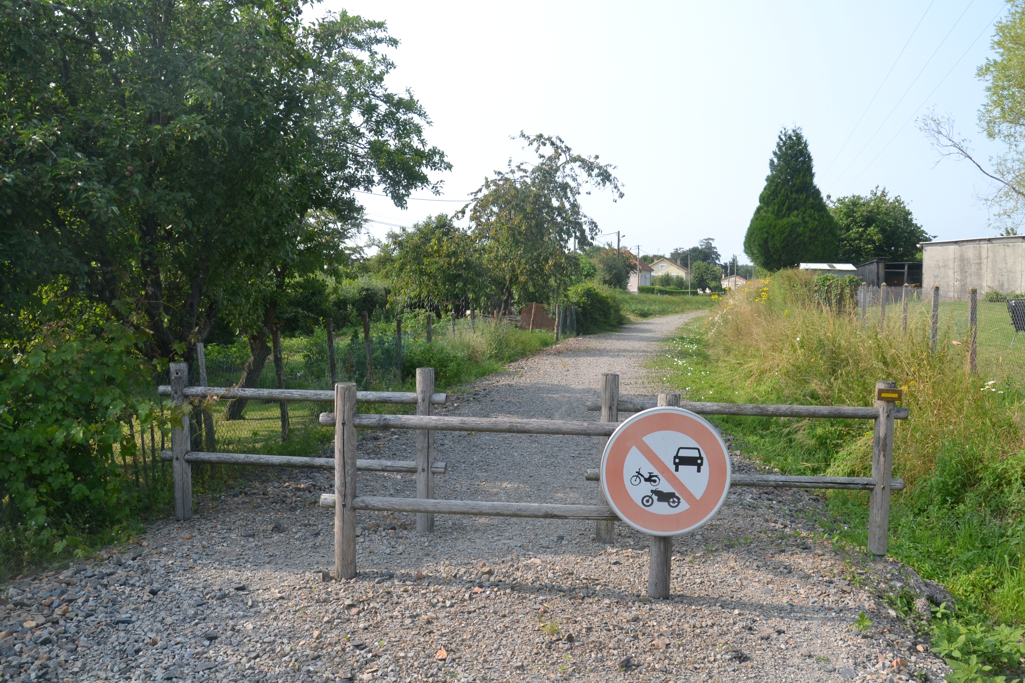 L'ancienne voie ferrée de Saillat-sur-Vienne à Bussière-Galant, à Rochechouart (Haute-Vienne, France)